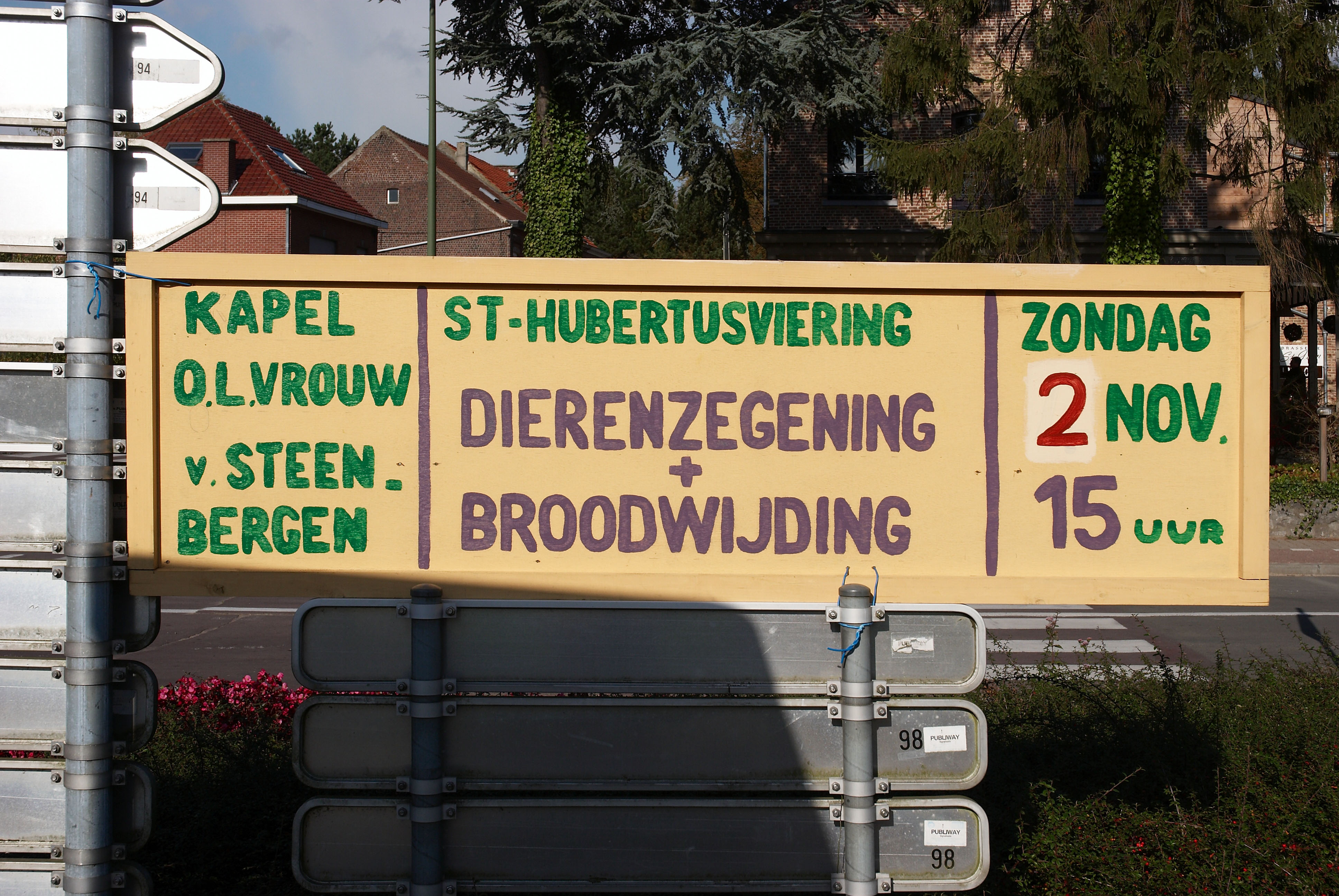 Aankondiging van dierenzegening en broodwijding in de kapel O.L. Vrouw van Steenbergen in Oud-Heverlee, België ter gelegenheid van de St-Hubertusviering. Op de feestdag van Sint Hubertus, de patroonheilige van jagers en de beschermer tegen hondsdolheid wordt er Hubertusbrood verkocht. Dit is brood dat door een katholiek geestelijke wordt gewijd en vervolgens als Hubertusbrood verkocht. Door dit brood te eten zouden de dieren en de mensen beschermd worden. In het verleden vooral tegen hondsdolheid. Het zegenen van dieren, vroeger vooral jachthonden, is bedoeld als bescherming van de dieren tegen onheil.